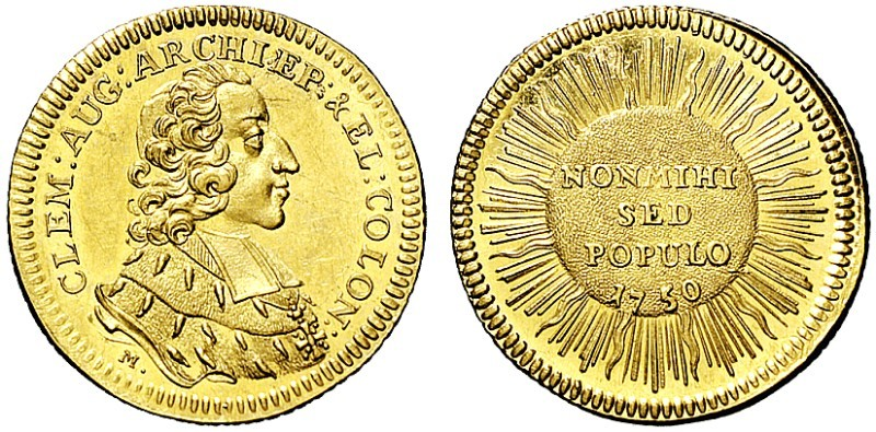 Büste des Erzbischofs und Kurfürsten von Köln (1723-1761) Clemens August von Bayern (1700-1761) Inschrift: CLEM : AUG : ARCHIEP : & EL : COLON : Rückseite: NON MIHI / SED / POPULO / 1750